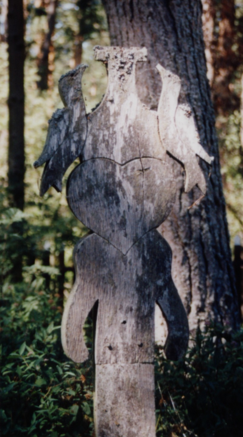 kurische Grabstele Nidden